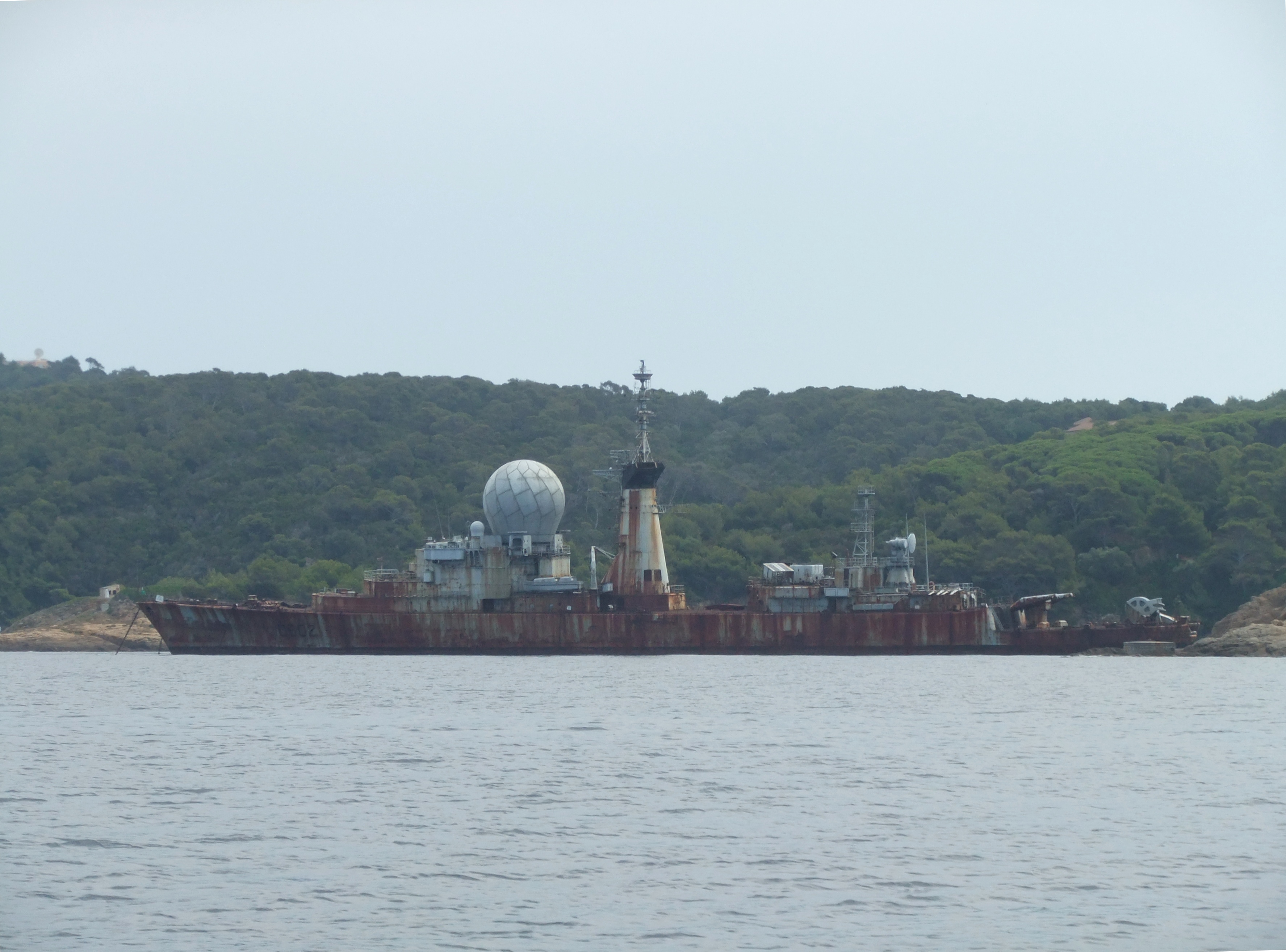 Le Suffren déclassé et embossé pour faire brise-lame à l'entrée de Port Avis sur la partie militaire de l'île du Levant.